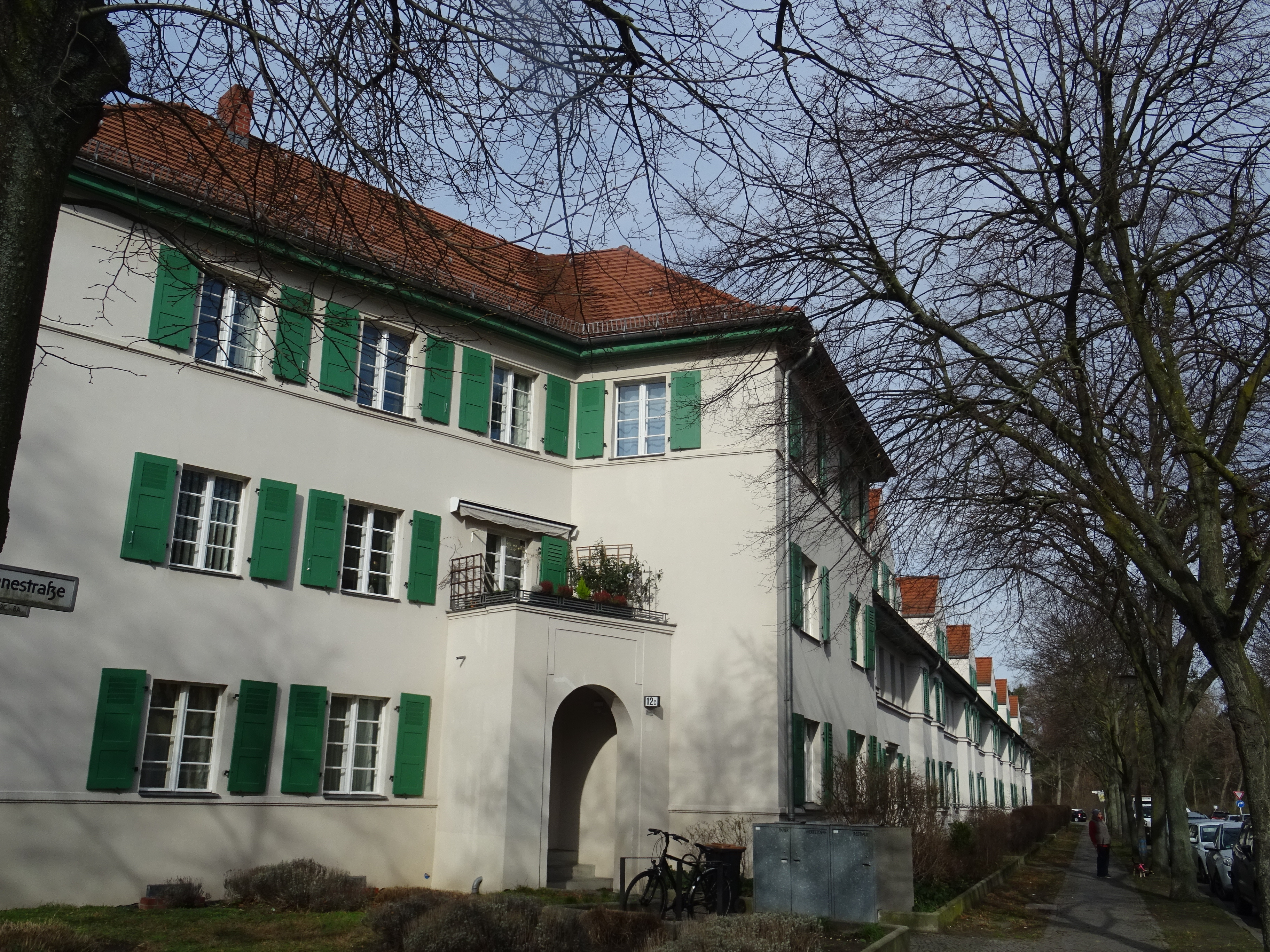 Berlin-Oberschöneweide, Siedlung Oberschöneweide von Peter Behrens u.a.,, Straßenzug in der Fontanestraße von der Zeppelinstr aus gesehen